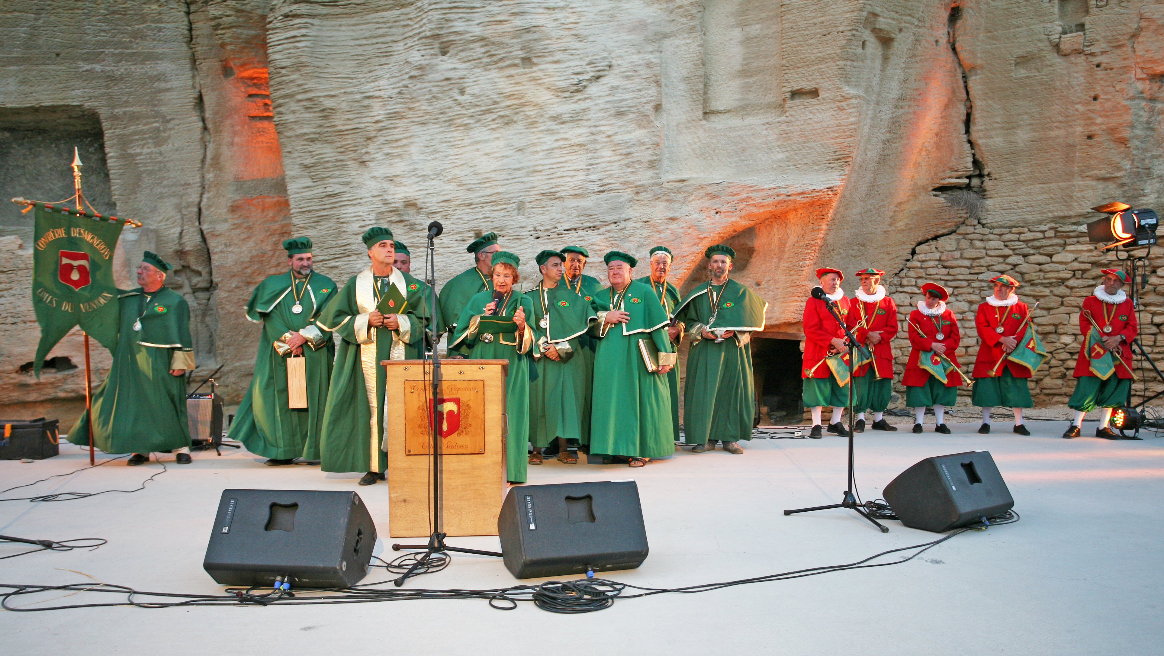 Confrérie des Côtes du Ventoux, cérémonie d'intronisation à Gordes, Vaucluse, France